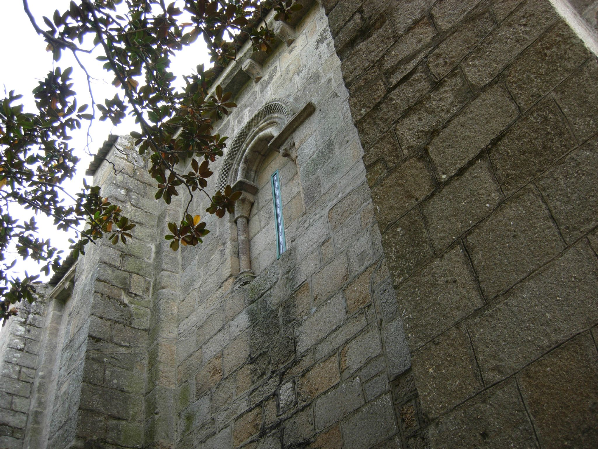 Ventá en un dos panos do muro setentrional da Igrexa de San MArtiño de Sobrán - Vilagarcía de Arousa - Pontevedra